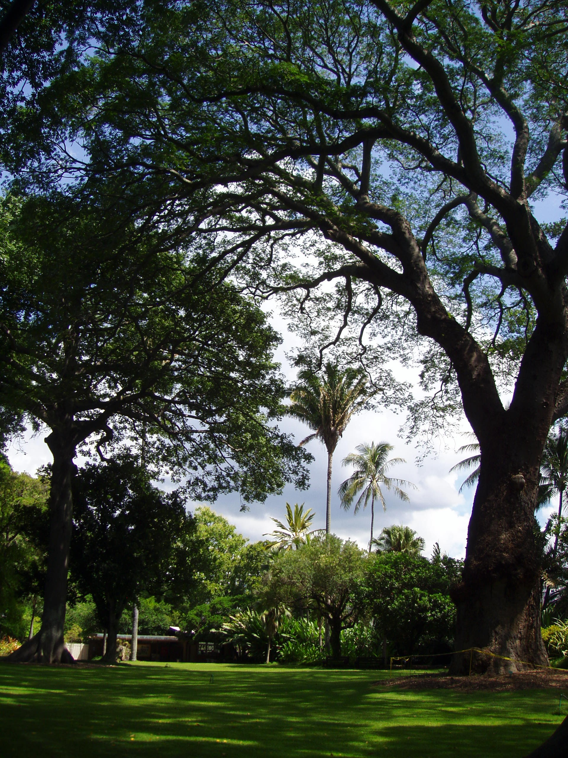 Foster Botanical Garden (general view) - Honolulu, Hawaii, USA.